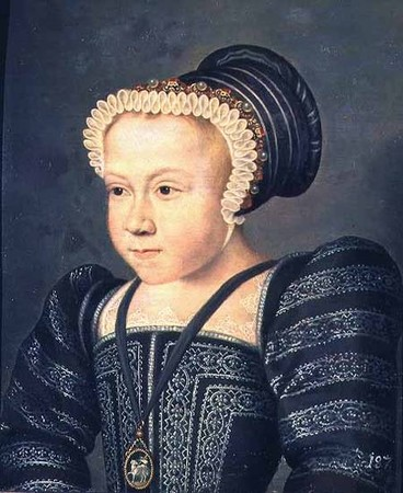 Maria Elisabetta di Valois (1572-1578) unica figlia di Carlo IX di Francia e Elisabetta d'Asburgo.